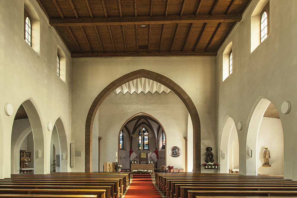 Innenansicht St. Agatha Aschaffenburg